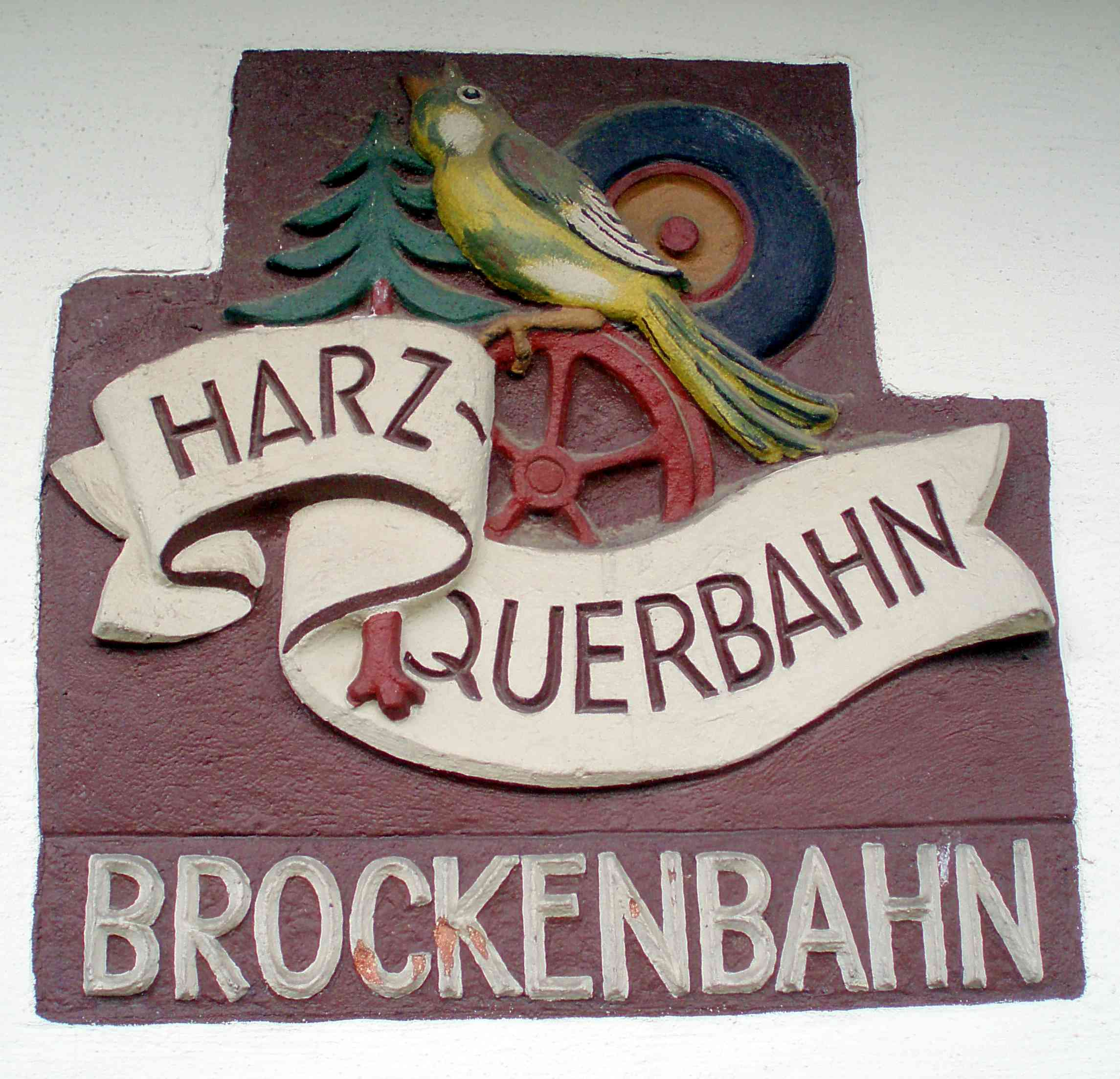 Bahnhof Harzquer- und Brockenbahn Wernigerode